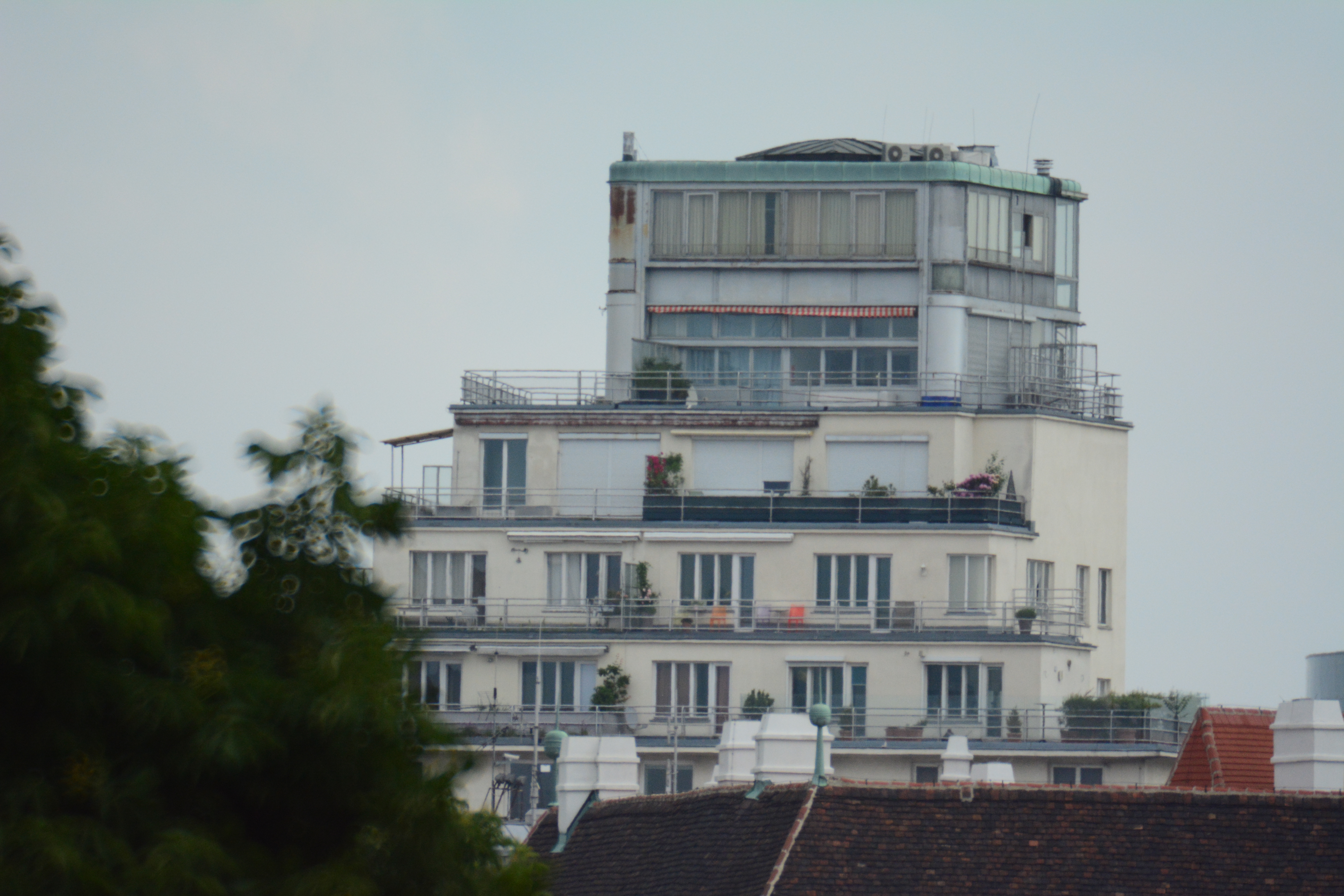 Zweites Wiener Hochhaus